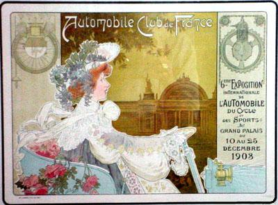 Affiche 6e Exposition Internationale de l'Automobile du Cycle et des Sports, 10-25 décembre 1903, organisée par l'Automobile Club de France (ACF), Grand Palais, Paris